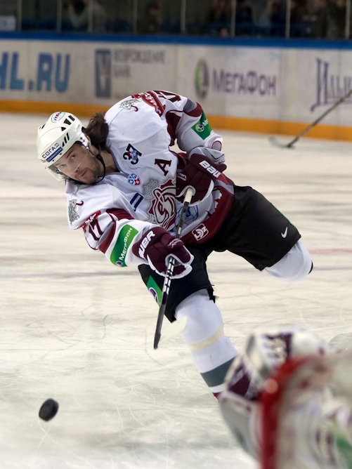 Александр Ниживий на предматчевой разминке матча КХЛ «Амур» — «Динамо» (Рига) 27 ноября 2011 года